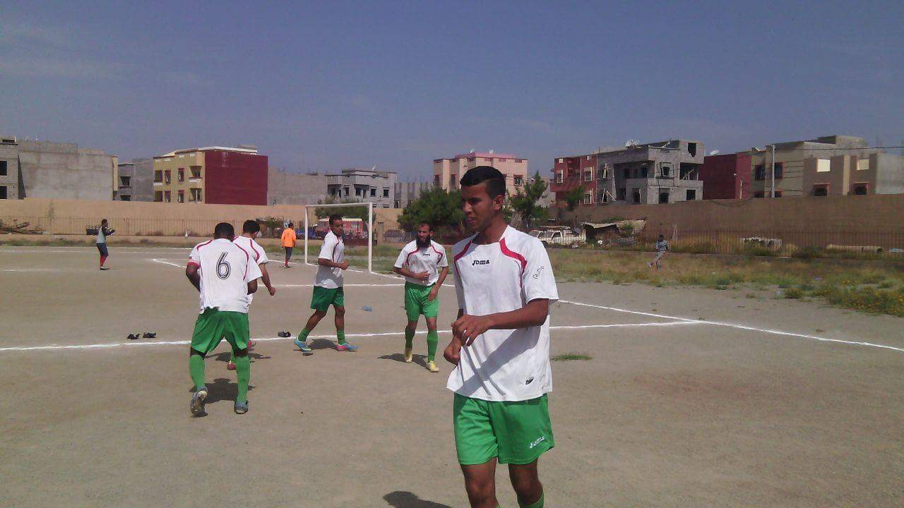 تمارين كرة القدم بعين المديور